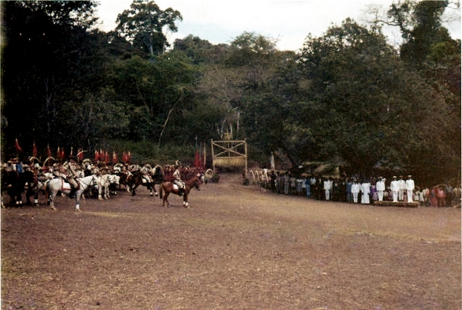 Esquadrão de Cavalaria 6 de Atabae em Huto Buicai